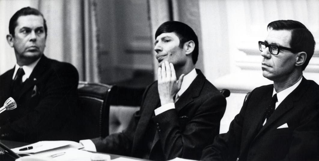 Grosheide, J.H. (ARP). Vlnr: Minister president Biesheuvel, Minister van Agt en Staatssecretaris Grosheide (rechts) tijdens het Kamerdebat over de Drie van Breda. Nederland, Den Haag, 29 februari 1972.